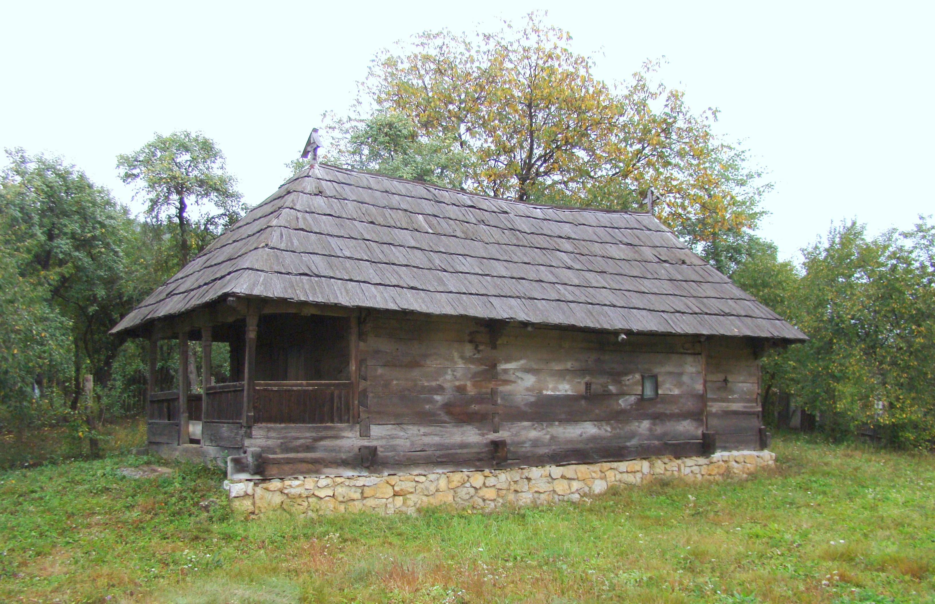 Biserica de lemn „Sf. Andrei” din Pocruia, județul Gorj